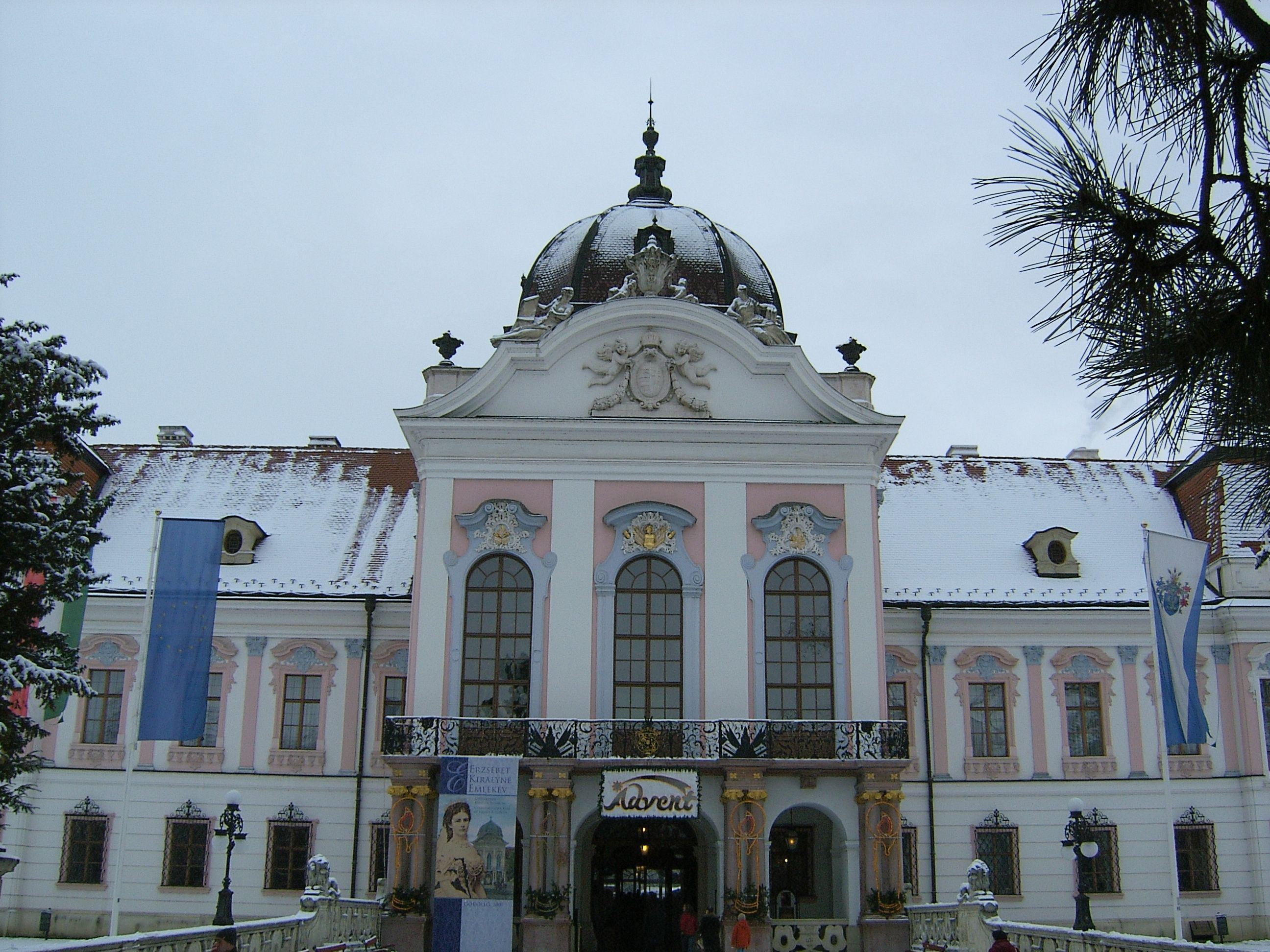 Grassalkovich–kastély, Gödöllő. Gödöllői Grassalkovich-kastély. Grassalkovich-kastély. This is a photo of a monument in Hungary, Identifier: 7051